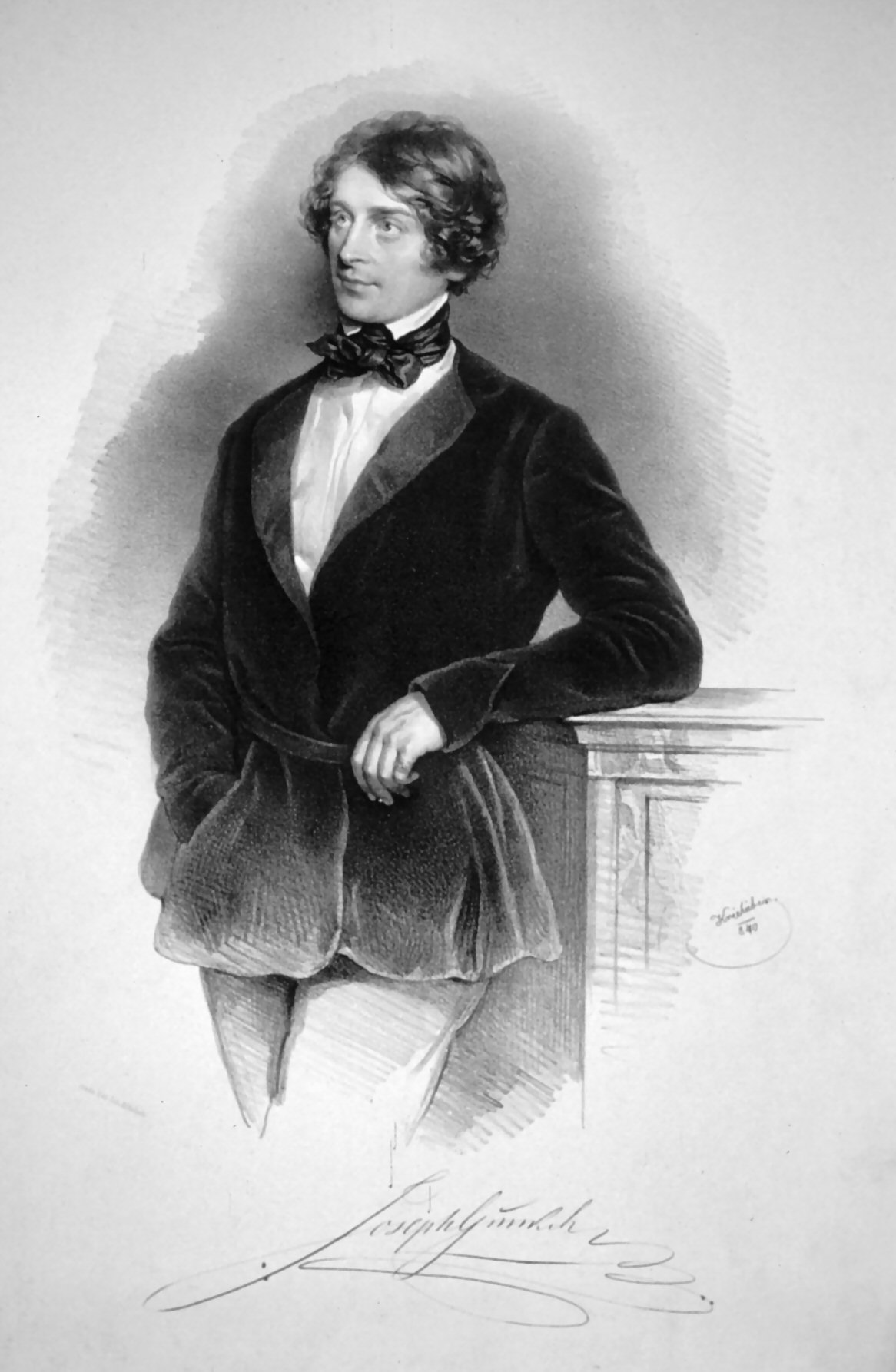 Josef Gunkel, Lithographie von Joseph Kriehuber (+1876), 1840